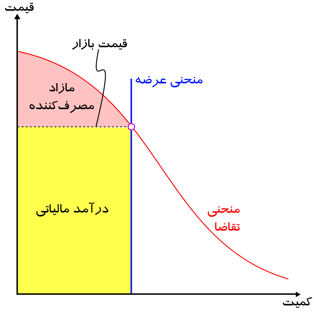 این نمودار تأثیر اِعمال بالاترین حد مالیات بر یک محصول با عرضهٔ کاملاً غیرکششی را نشان می‌دهد.